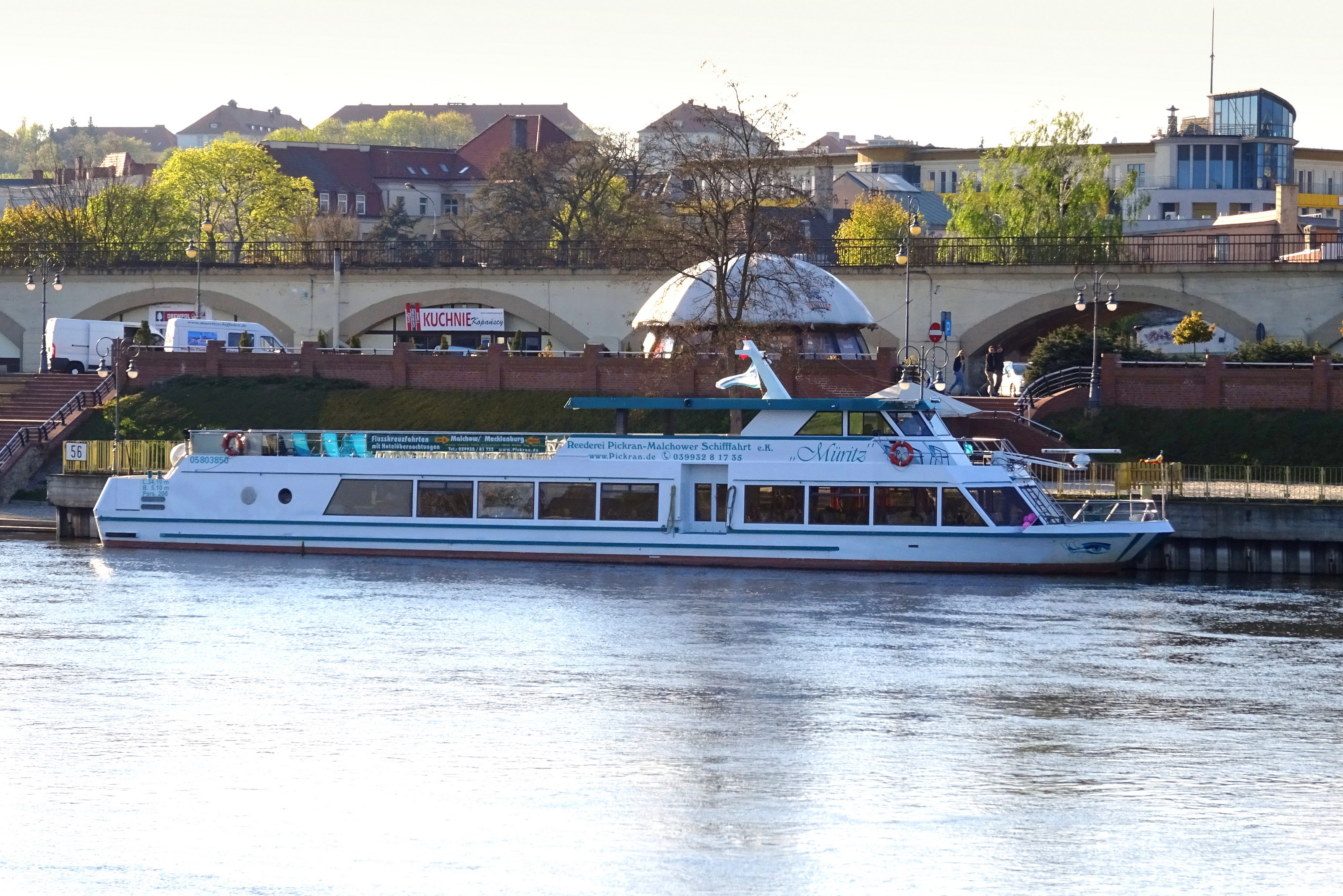 Gorzów Wlkp., przystań statków "białej floty" z przycumowanym MS Müritz z Meklenburgii